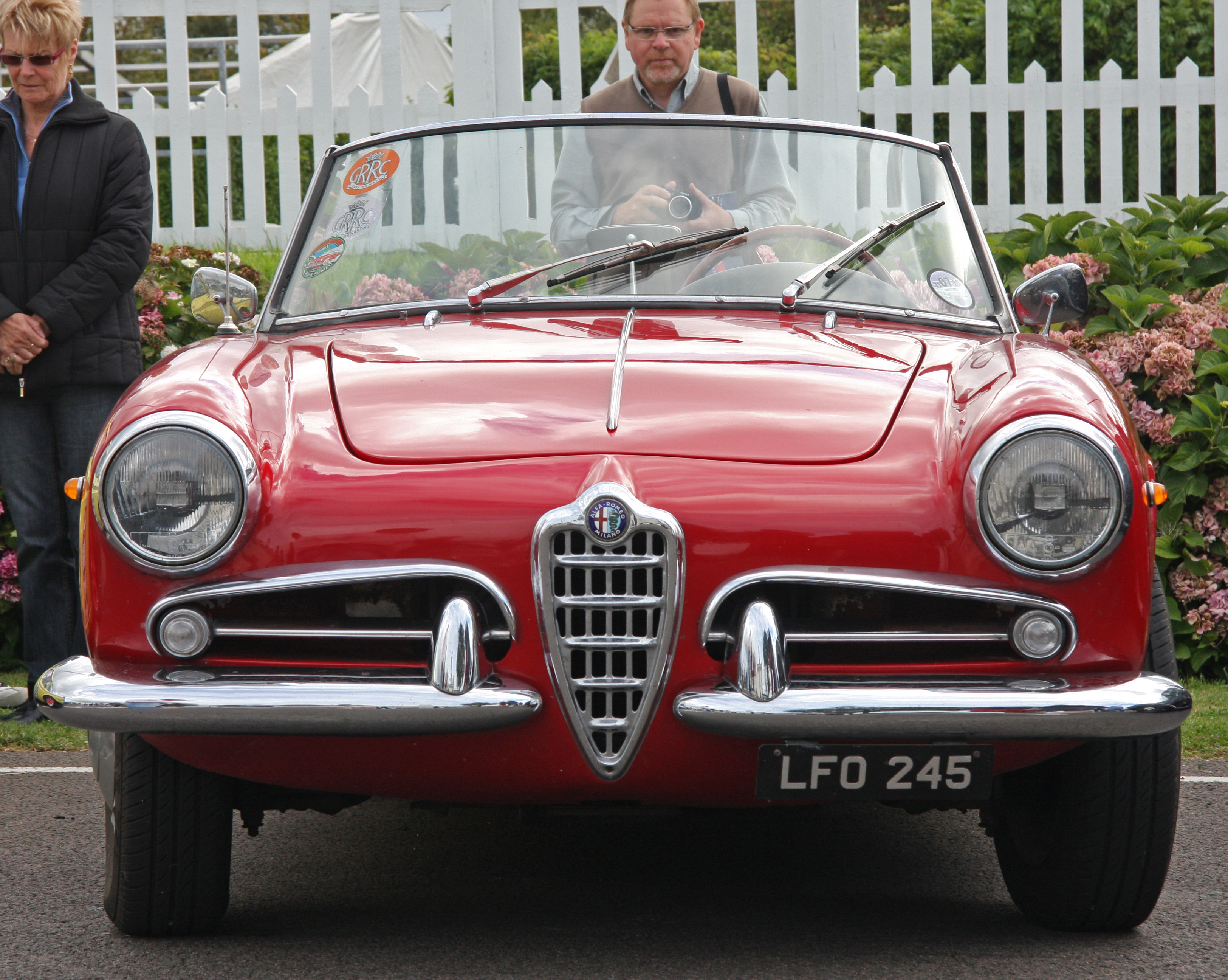 Alfa Romeo